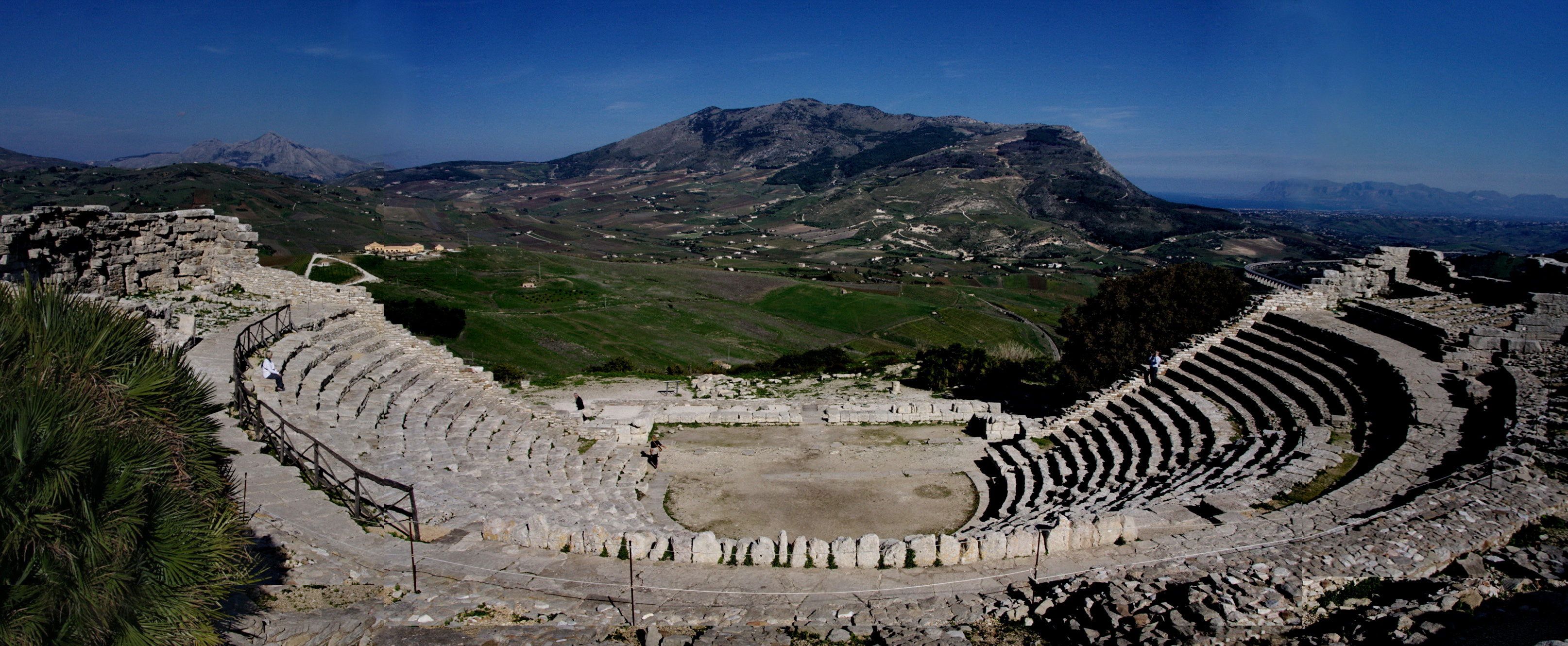 Teatre grec de Segesta (Sicília)